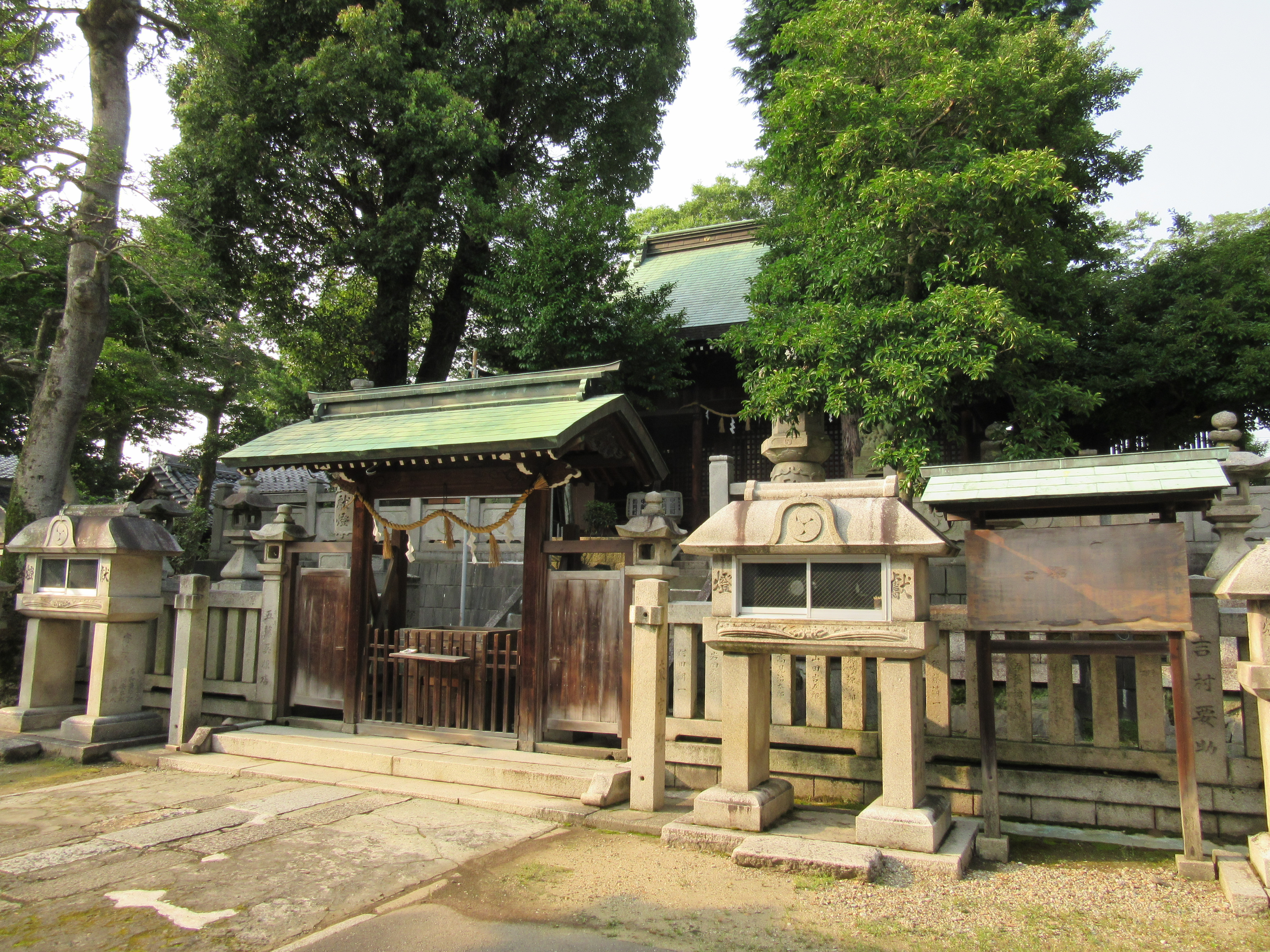 産霊神社 (笠松町)